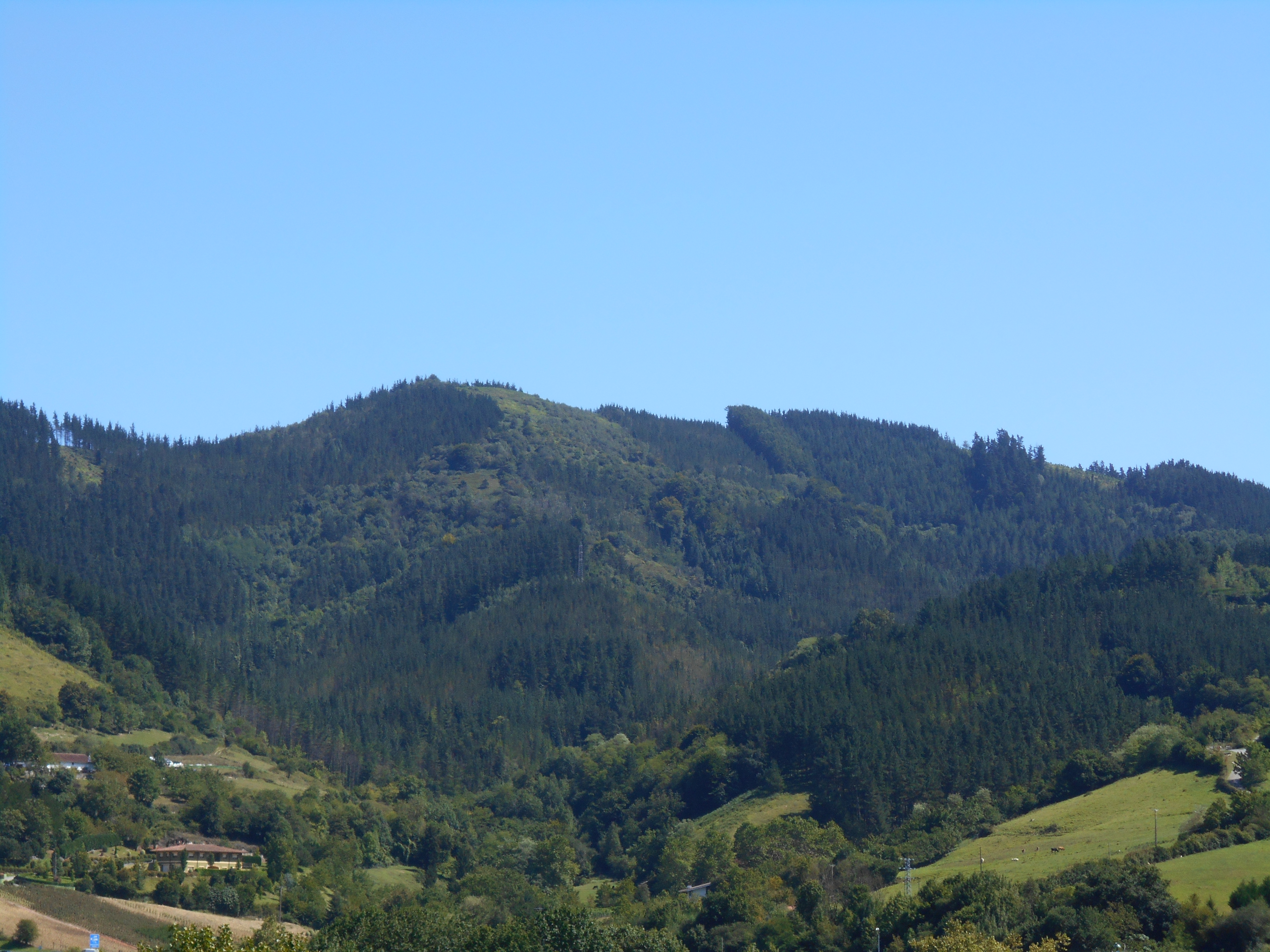 Monte Santamañazar visto desde la colina de San Miguel